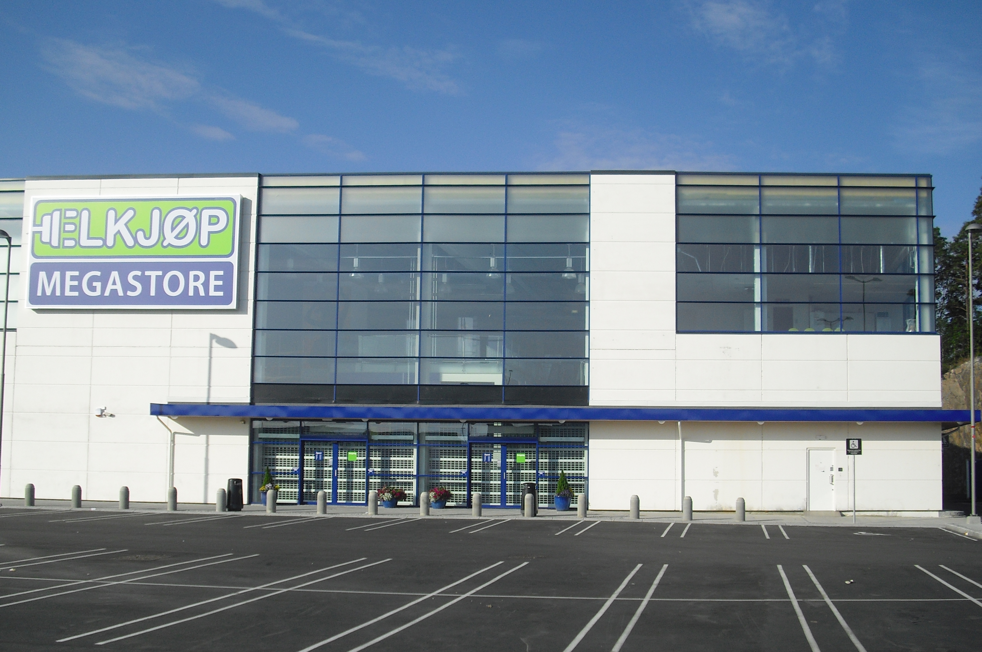 Elkjøp Megastore i Kristiansand